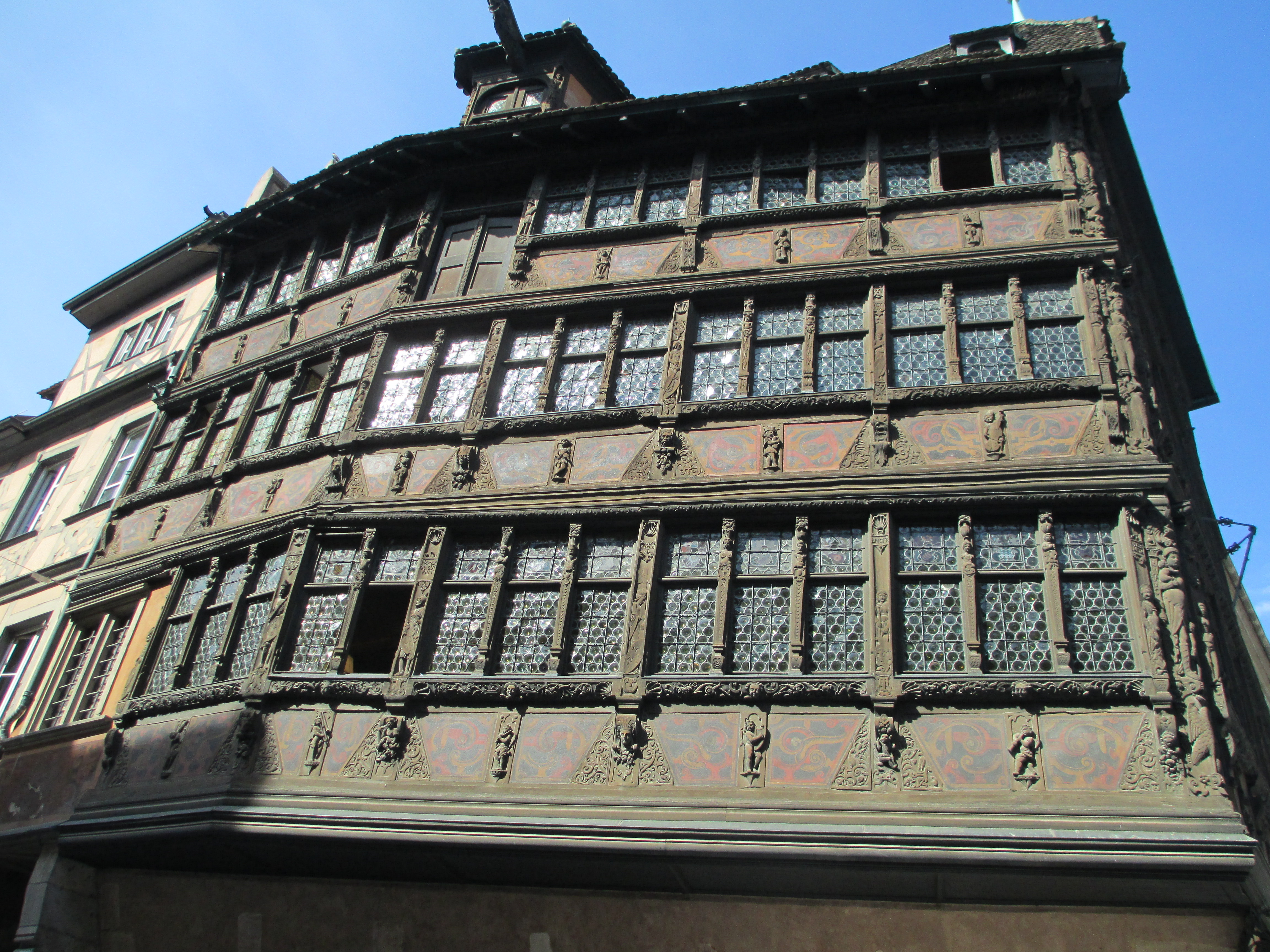 בית קמרזל בשטרסבורג